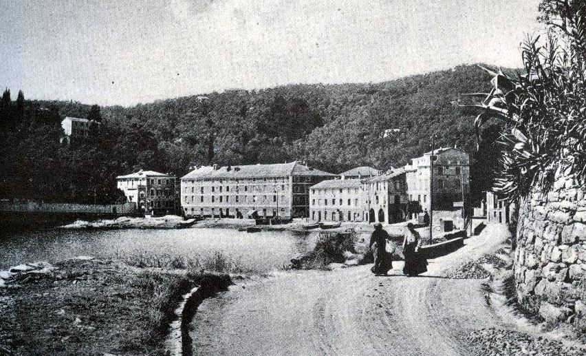 Panorama di fine Ottocento del litorale sanmichelino, Rapallo, Liguria, Italia